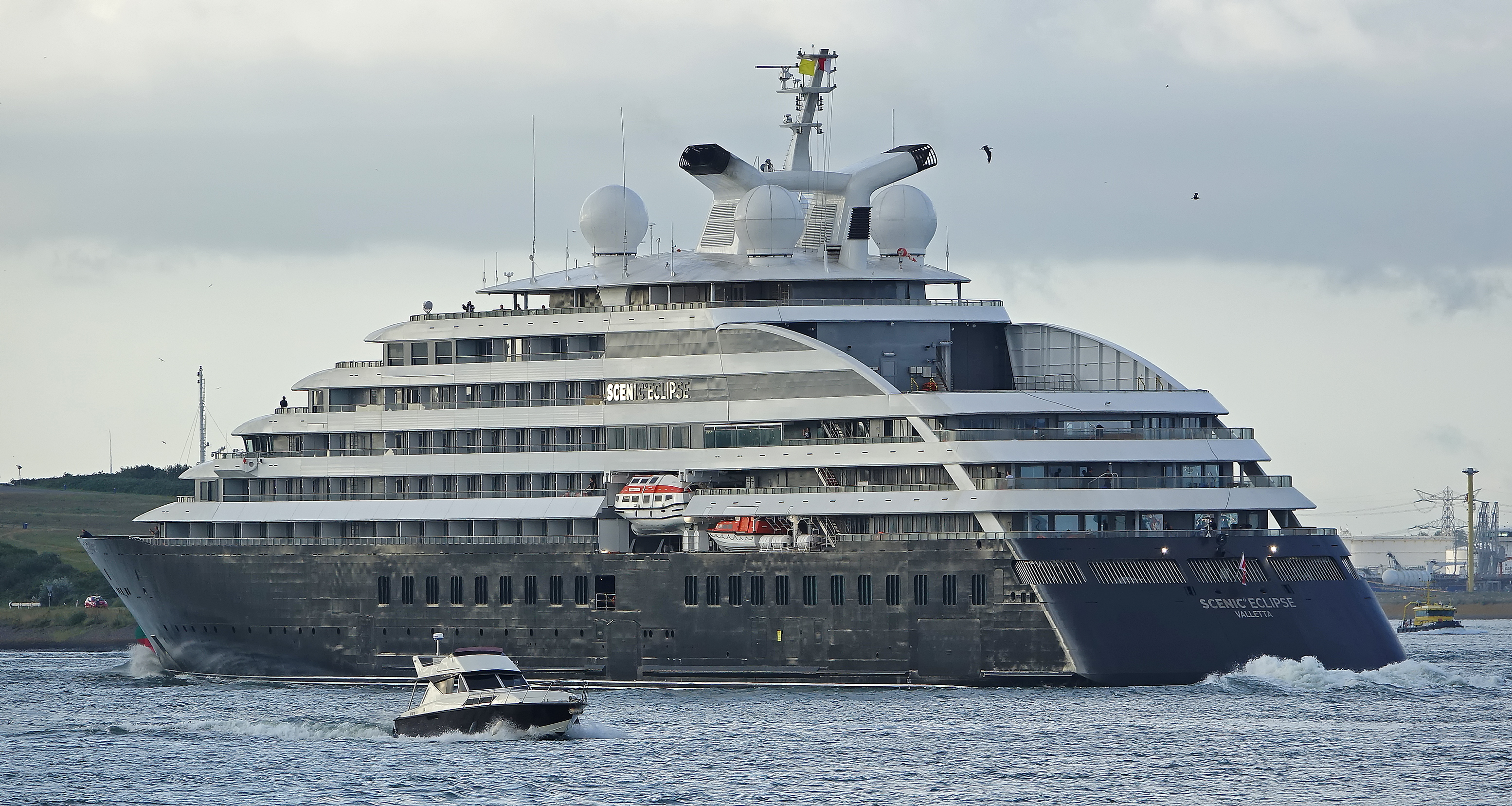 Hoek van Holland 8-8-2019